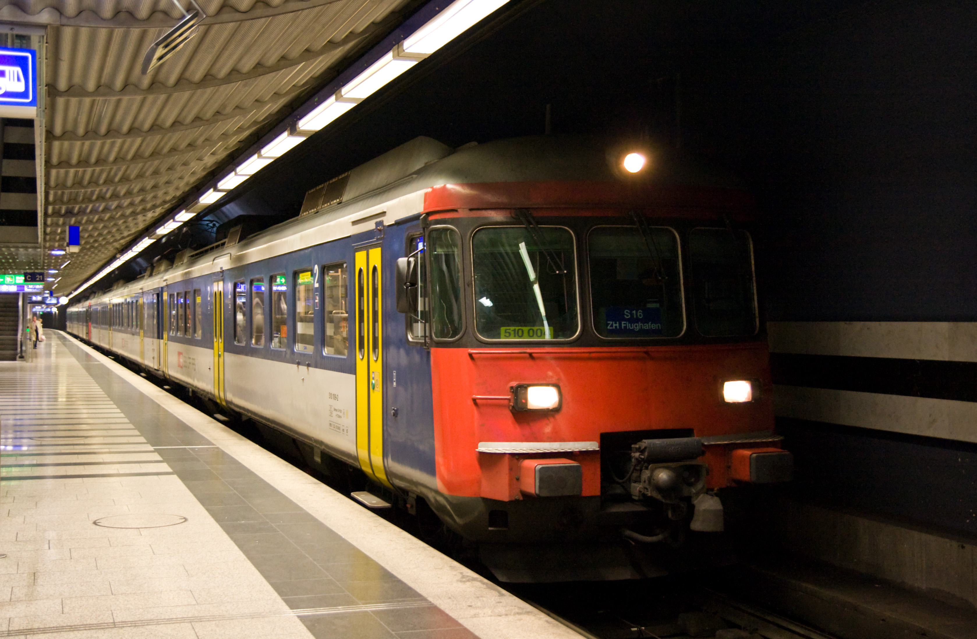 SBB RABDe 510 in Zürich Hauptbahnhof, Bahnhofsteil Museumstrasse